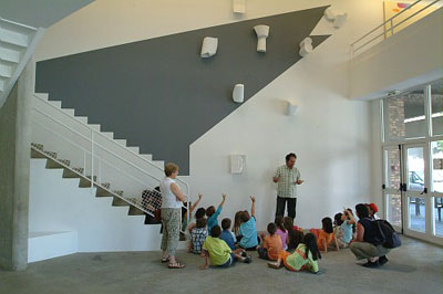 espace contemporain